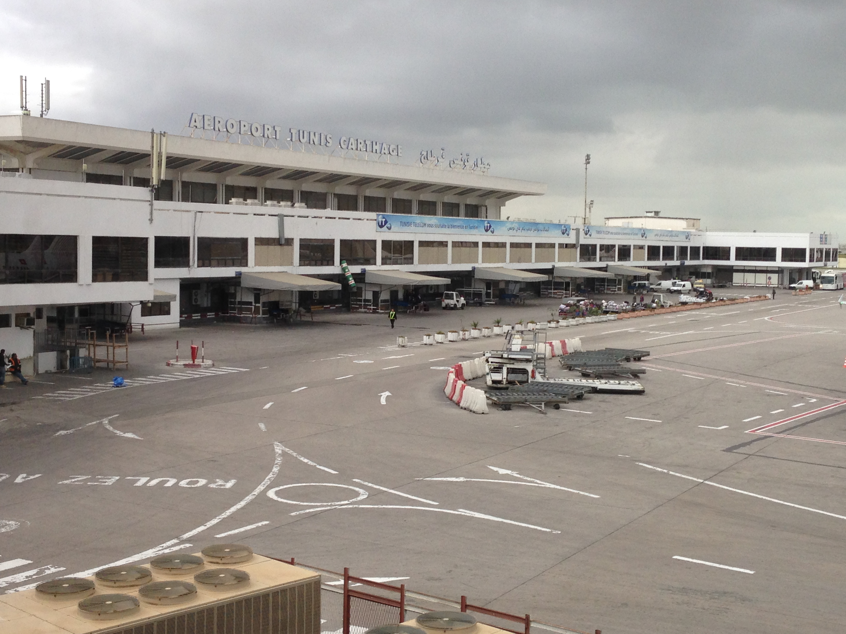 Terminal de l'aéroport de Tunis-Carthage (Tunisie)